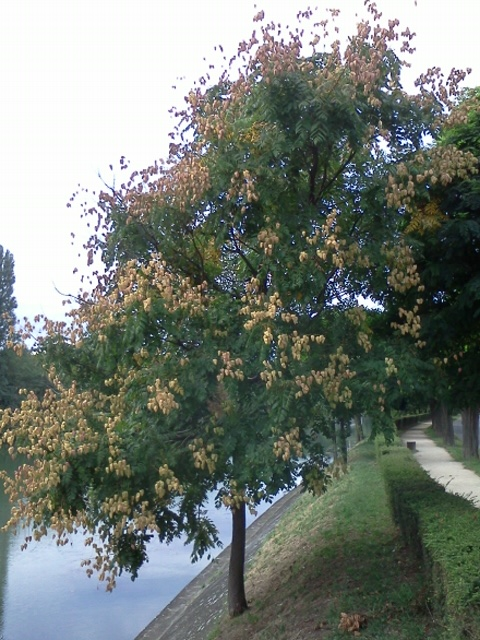 Koelreuteria paniculata